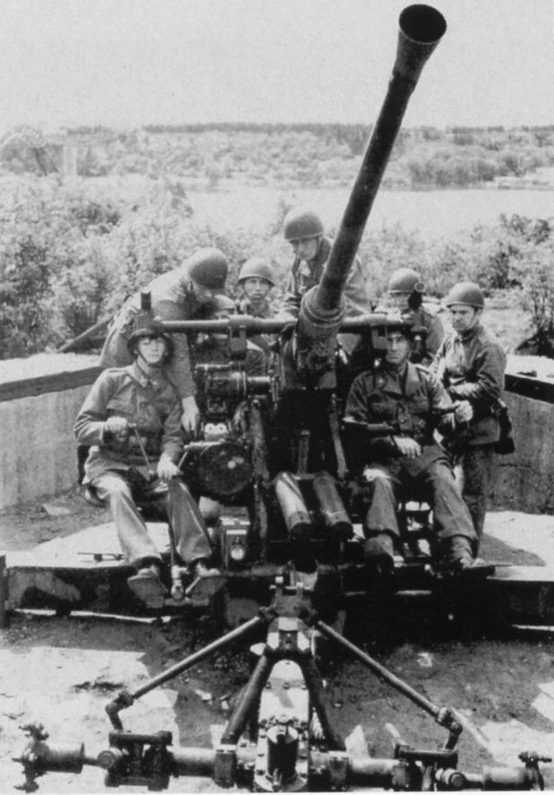 Tantolundens luftvärnsbatteri i Stockholm med en 40 mm luftvärnsautomatkanon m/36